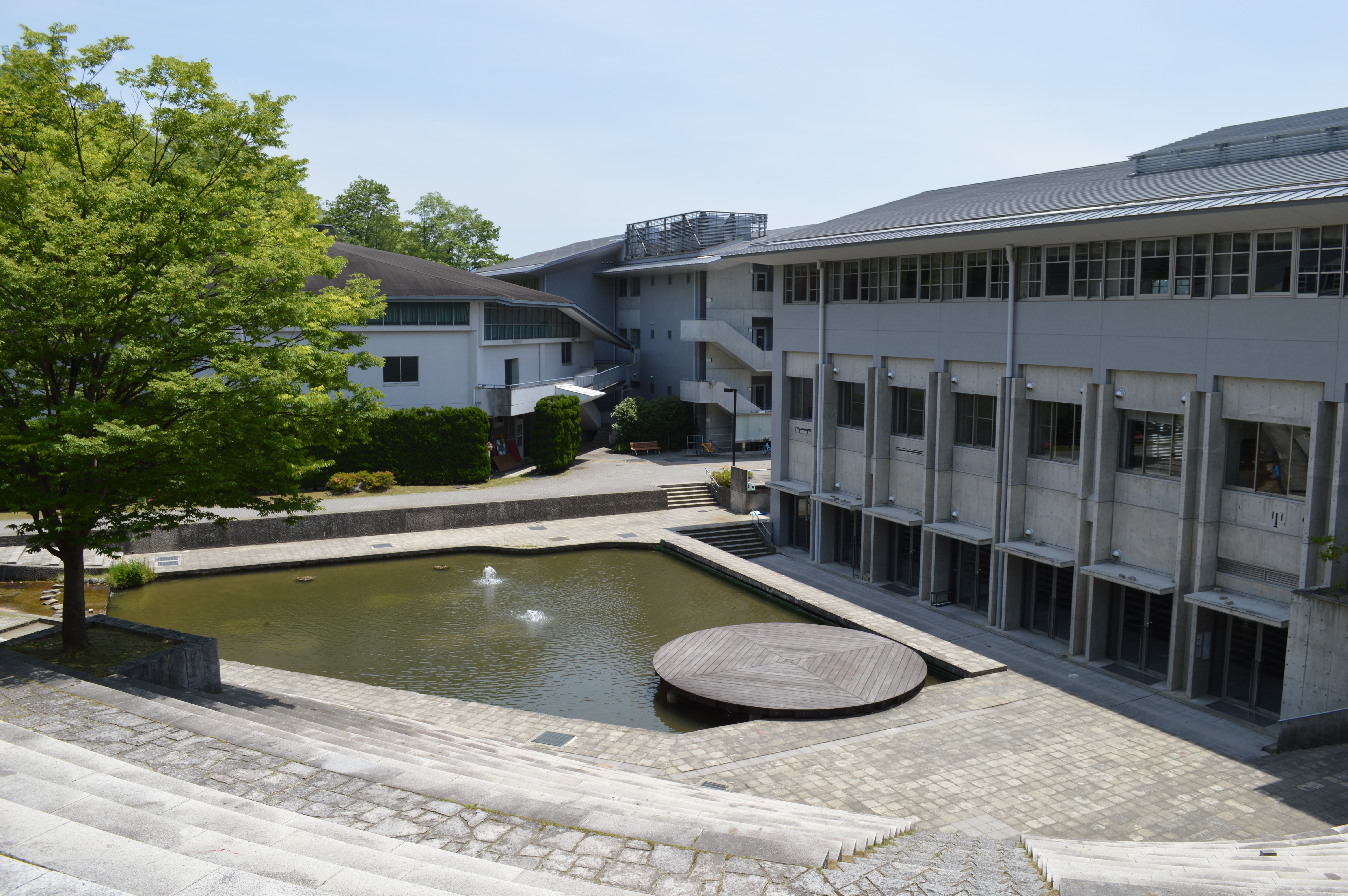 京都市左京区岩倉 京都精華大学 キャンパス中央付近の天ヶ池と黎明館（右）と明窓館（左奥）